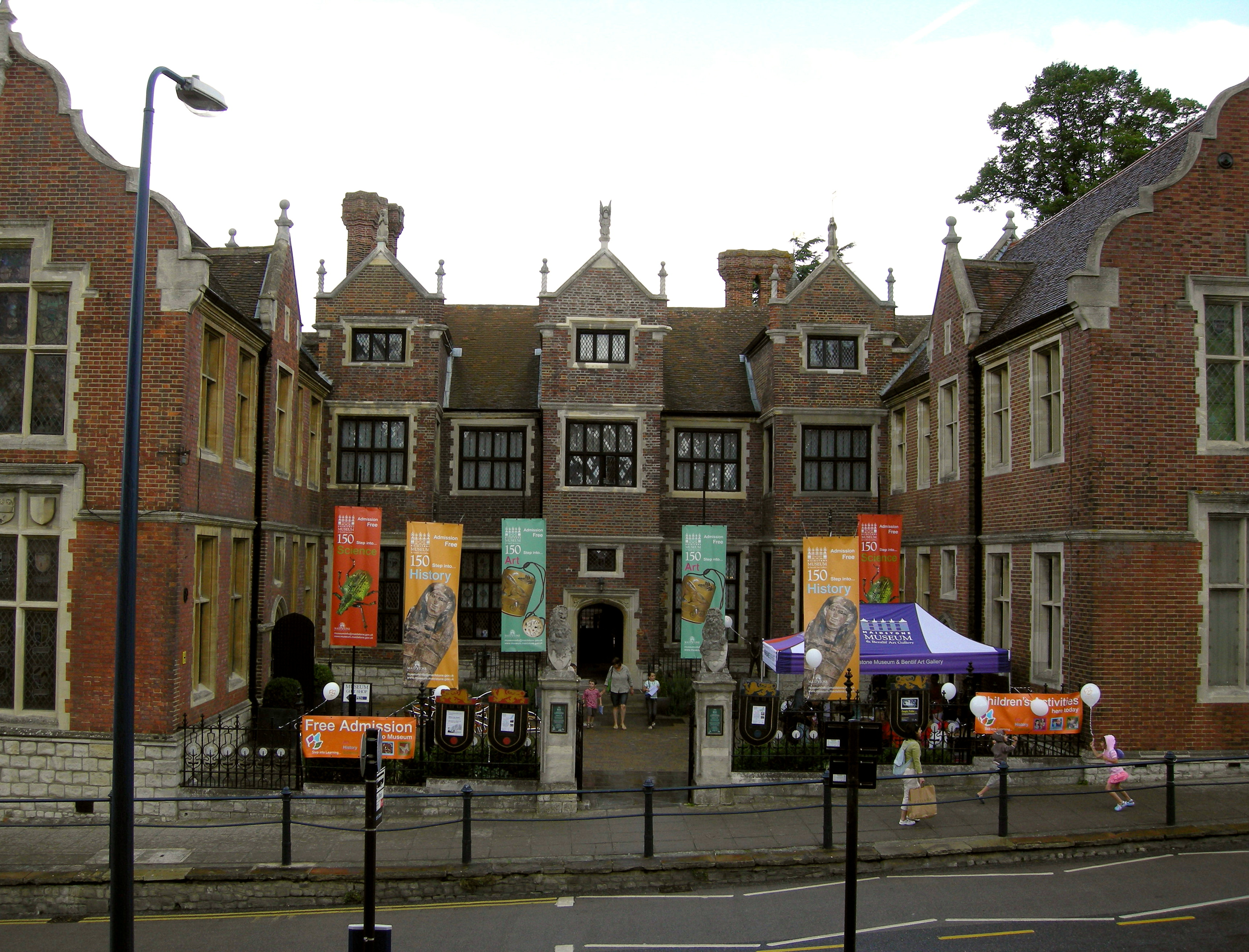 Maidstone Museum, Kent, England.